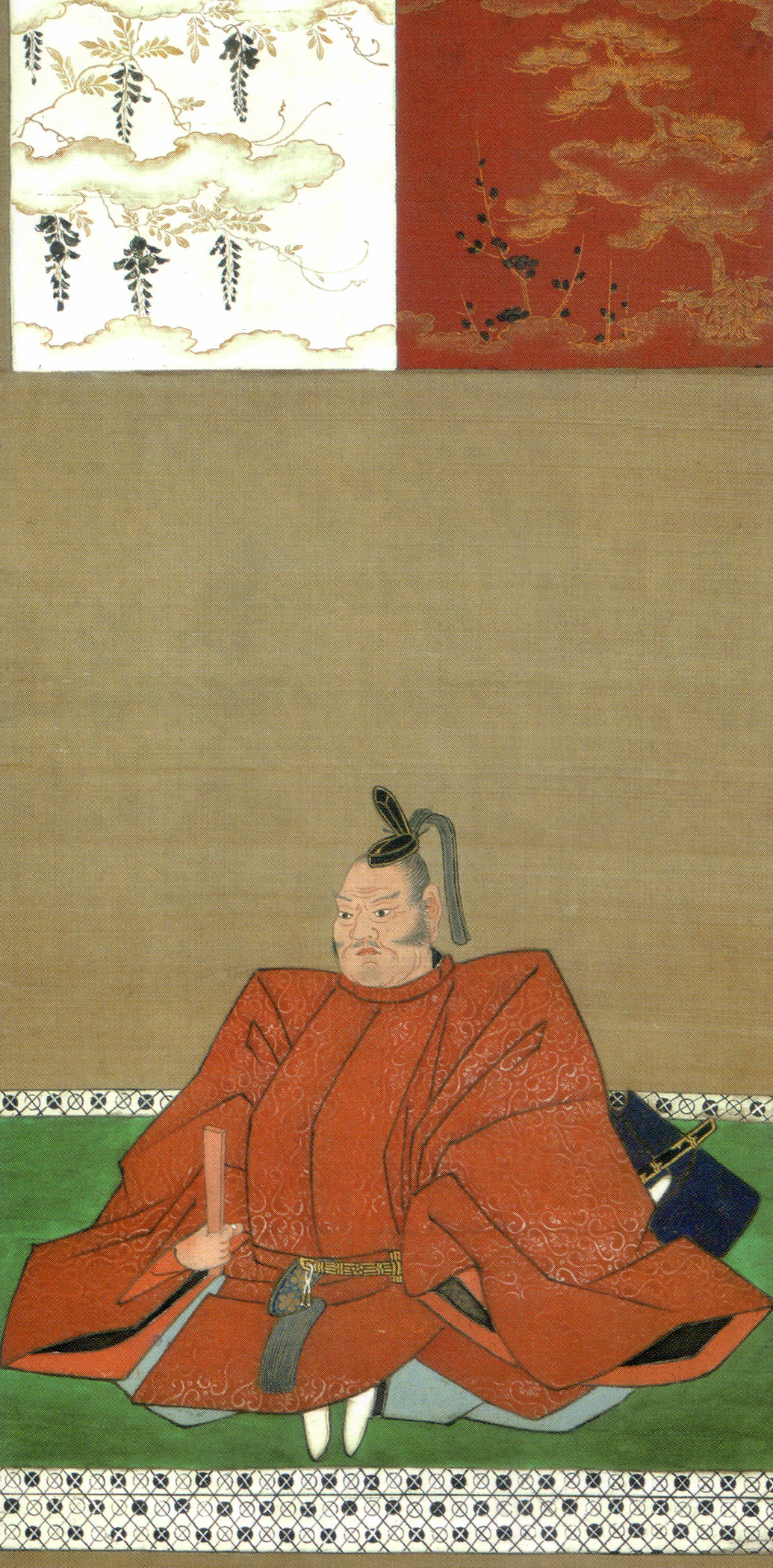 相良頼房（長毎）像 （江戸時代前期（17世紀）製作）